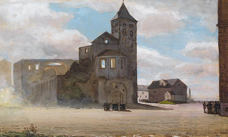 Abteiruine Hersfeld, 1880, Gouache. 22,5 x 37,5 cm.